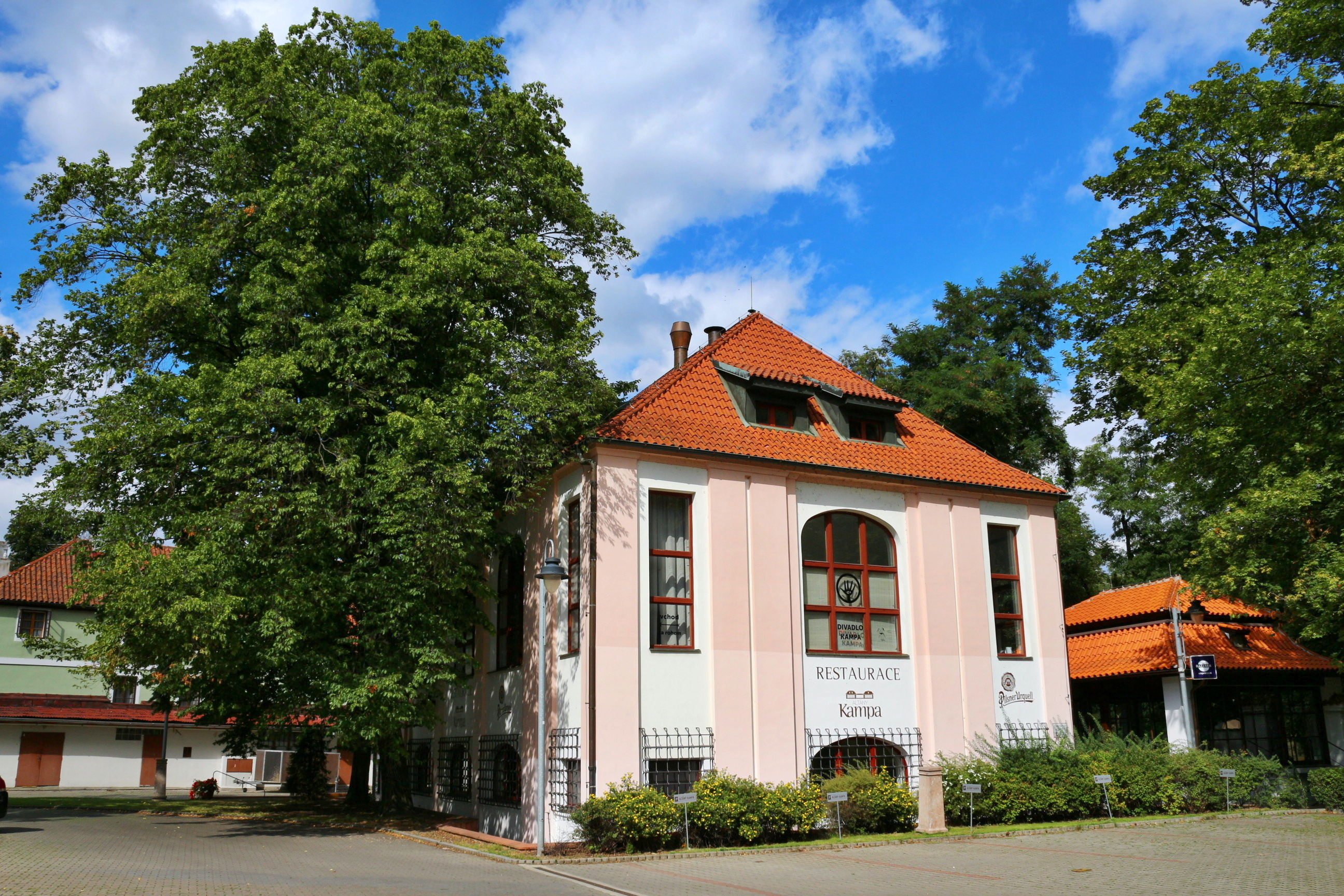 Malé Nosticovo divadlo